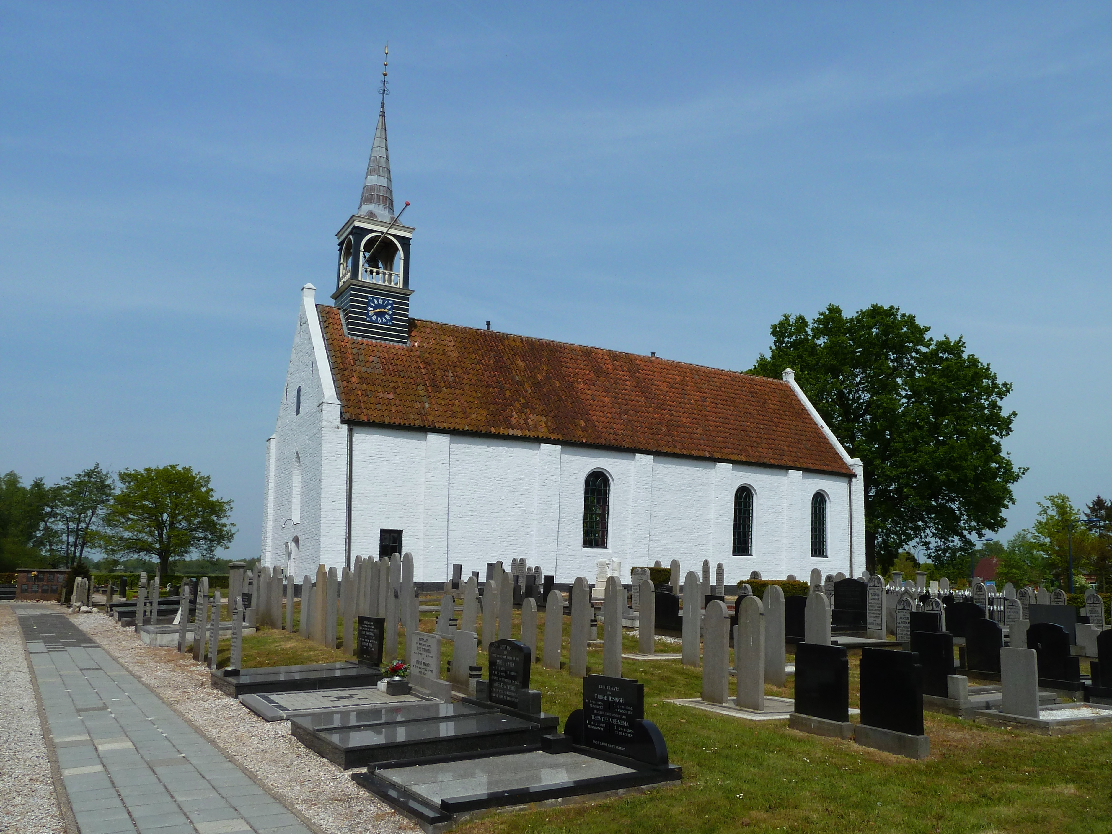 Hervormde kerk van Niebert (Marum, Groningen, Nederland).